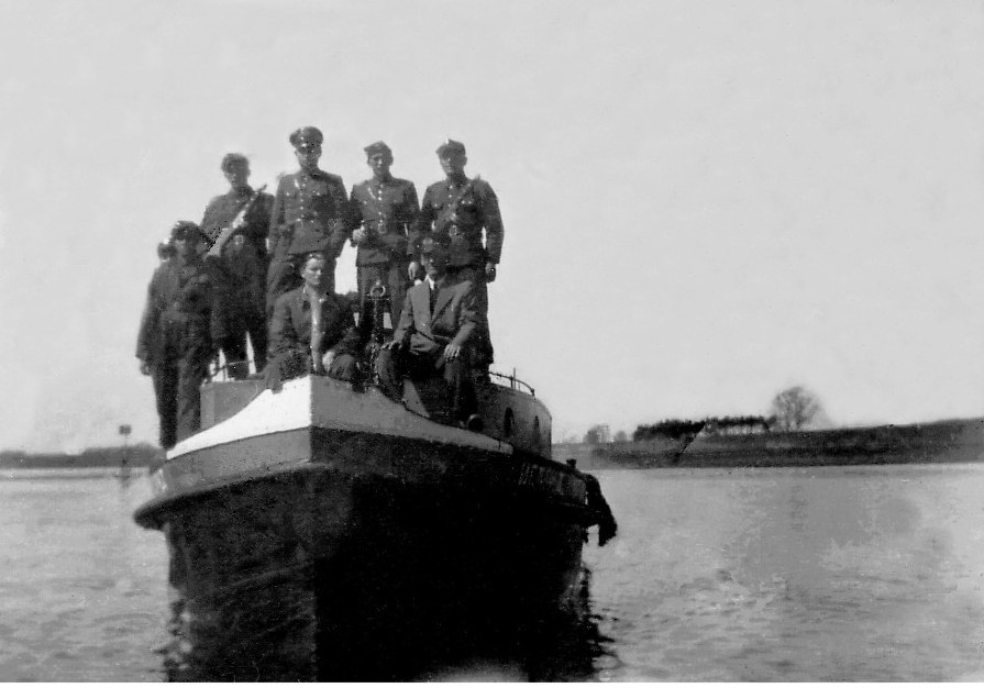 Żołnierze GPK Miłów w latach 50. XX w.